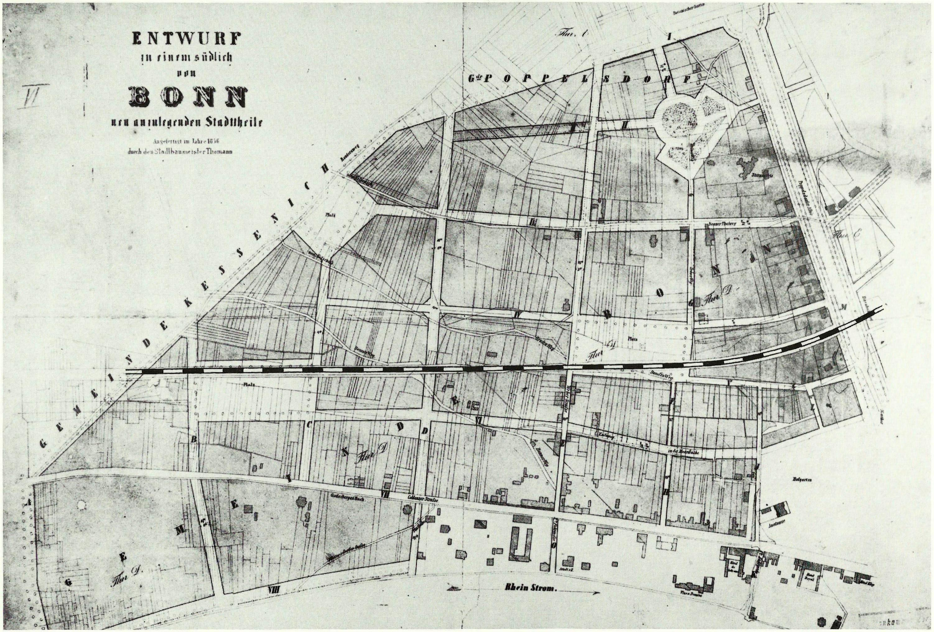 Plan des Bonner Stadtbaumeisters Paul Richard Thomann für die neu anzulegende Südstadt (Entwurf zu einem südlich von Bonn neu anzulegenden Stadttheile)